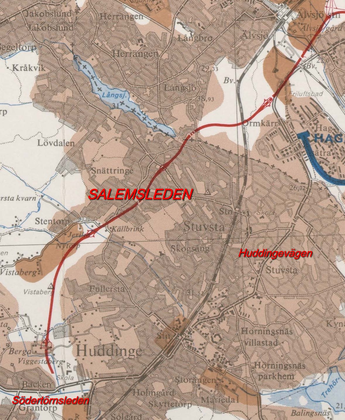 Salemsleden karta 1965